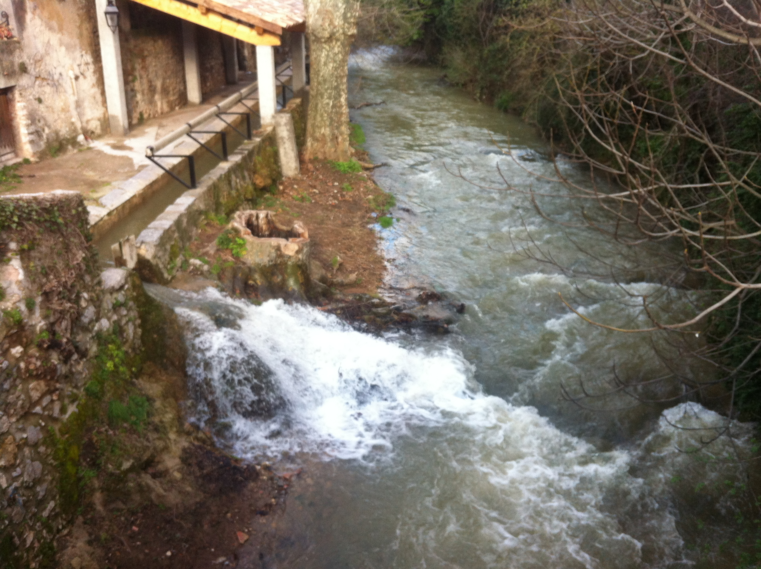 lavoir